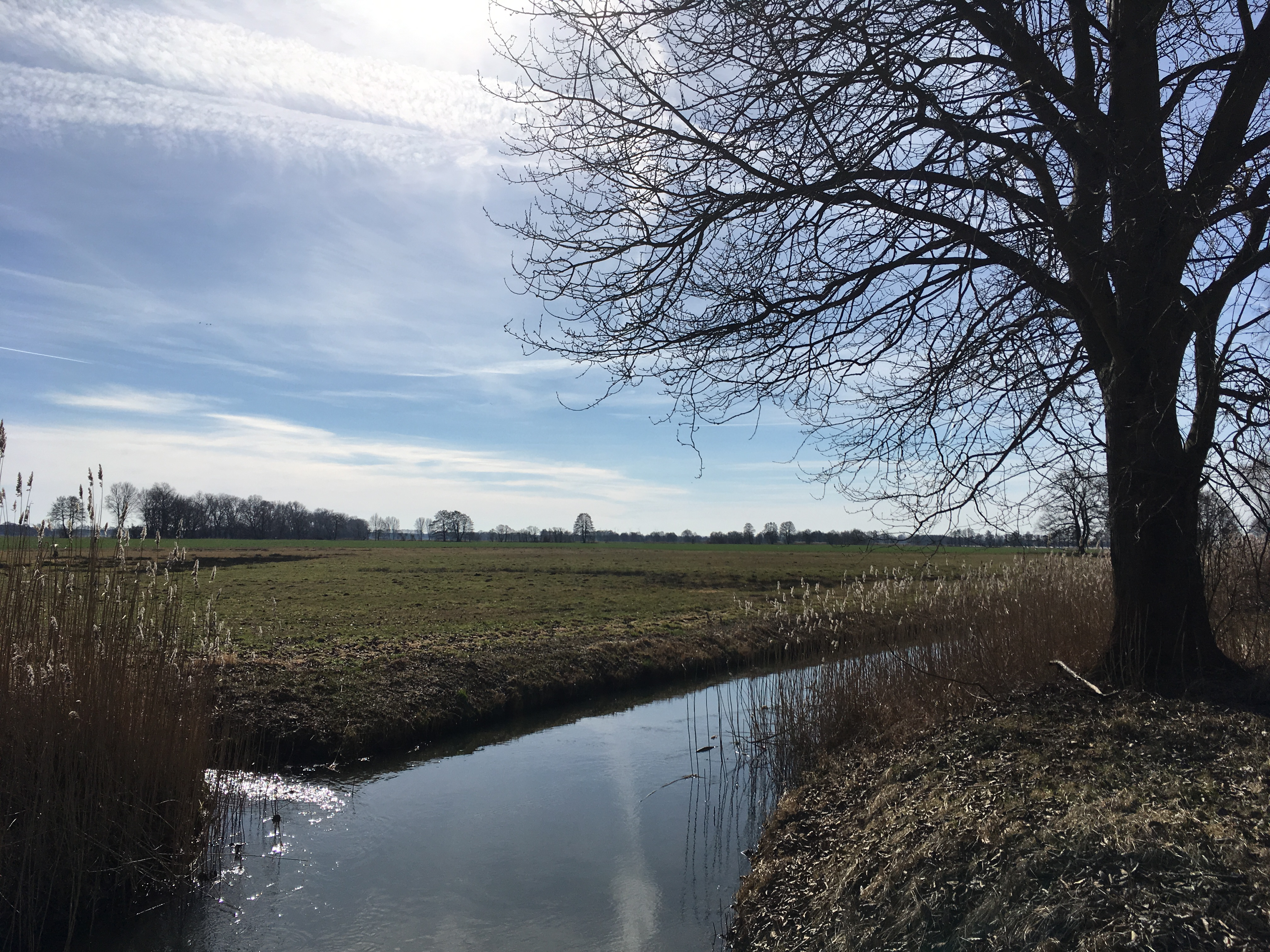 Der Neue Graben ist ein Entwässerungskanal, der bei Salzbrunn in Beelitz die Felder entwässert und in die Nieplitz führt.